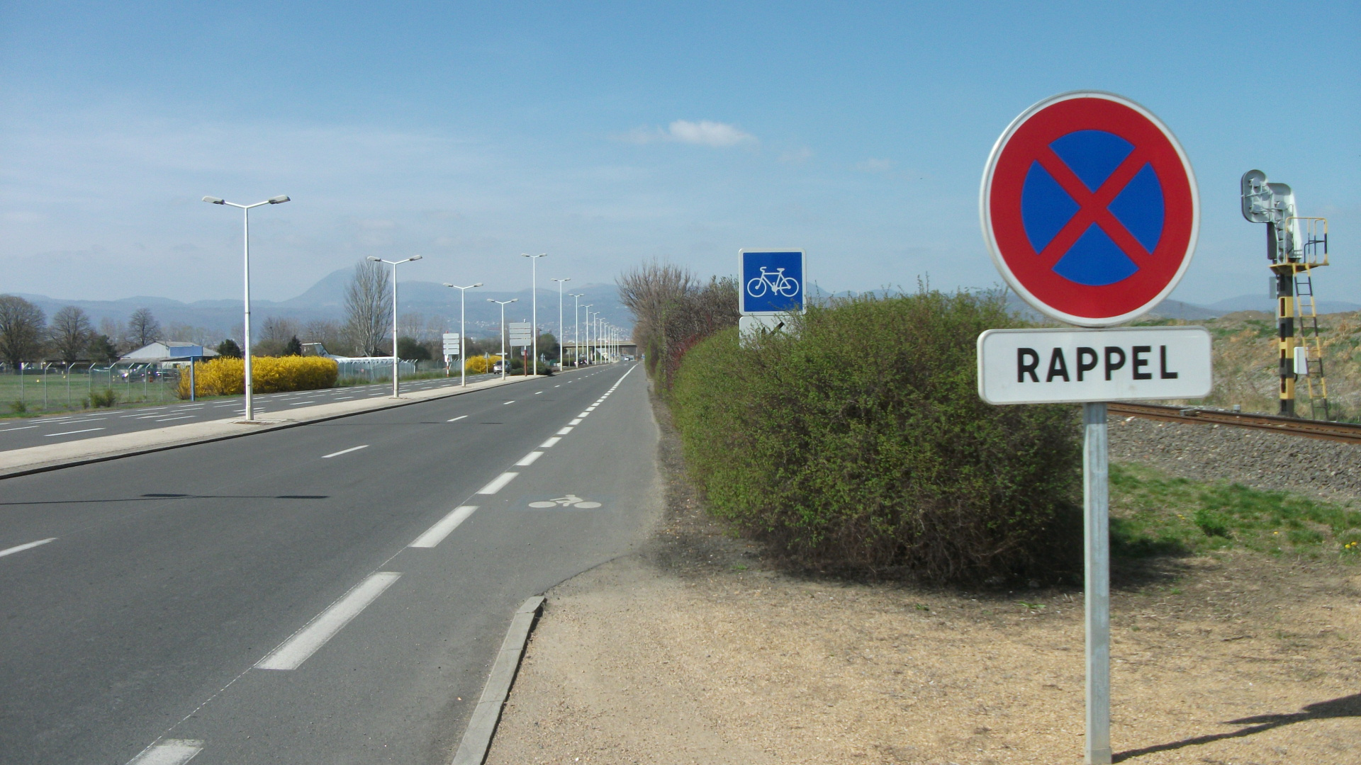 Sur la D 769 (63) : Panneau interdisant l'arrêt (avec un panonceau de rappel) – SES 2006-2004 ; plus loin un panneau de début de bande cyclable et son panonceau – Girod 2011Concrètement, il est interdit de s'arrêter et de stationner sur l'accotement qui est une bande cyclable et conformément à la signification du panneau C113, il indique aux conducteurs des autres véhicules qu'ils n'ont pas le droit d'emprunter cet aménagement ni de s'y arrêter.